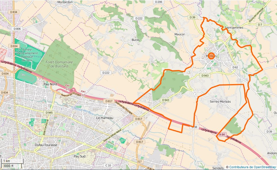 Morlaàs Limite communale This map may be incomplete, and may contain errors. Don't rely solely on it for navigation.